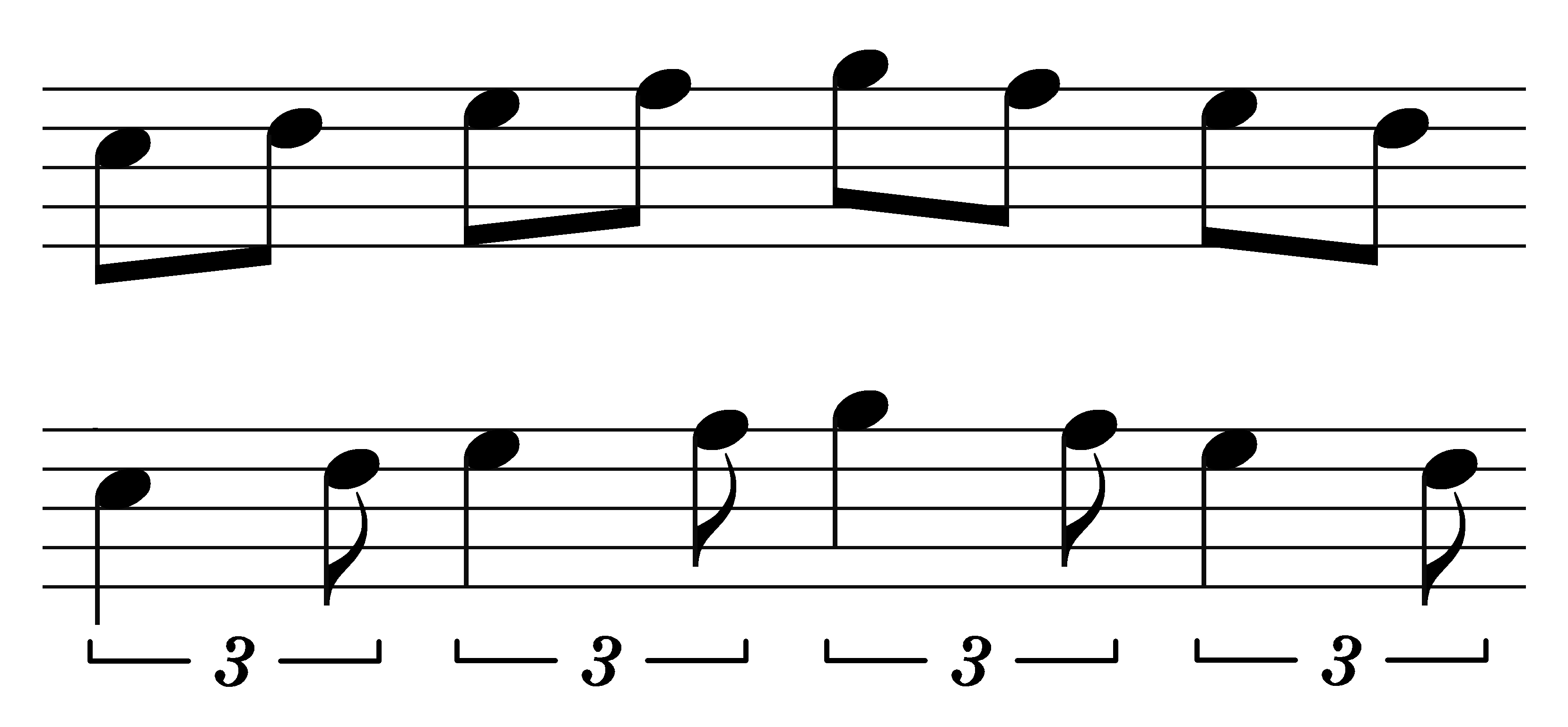 triolische Achtelkette